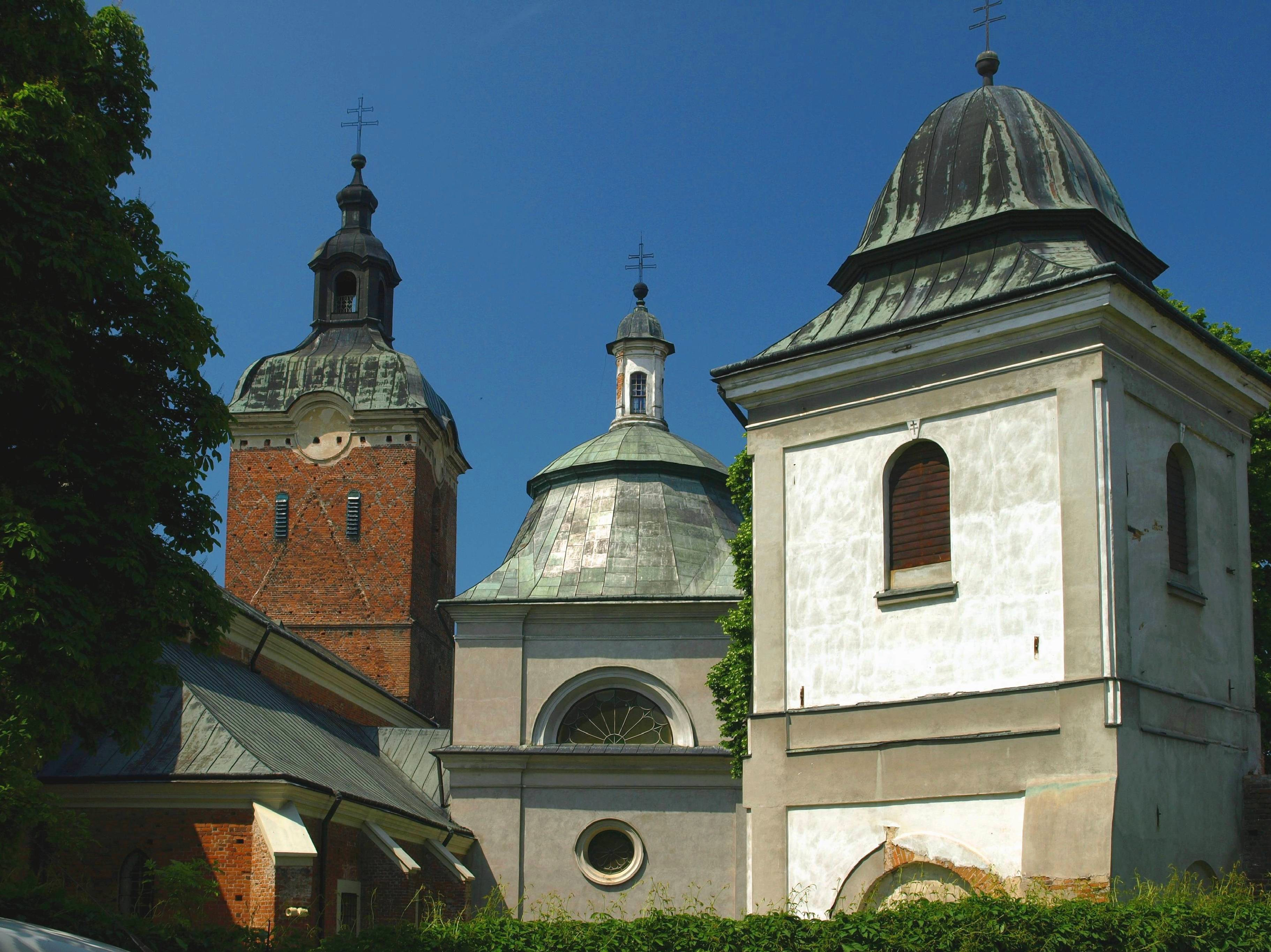 zespół klasztorny bożogrobców w Przeworsku (woj.podkarpackie).